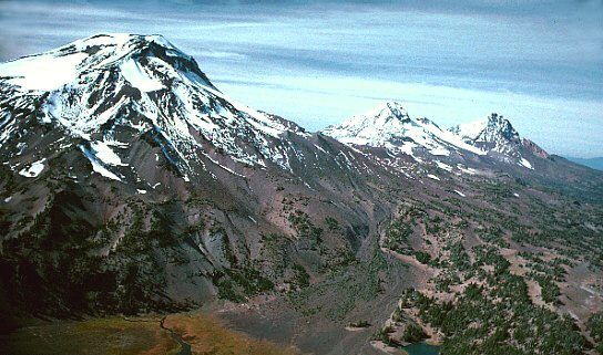 Three Sisters in Oregon